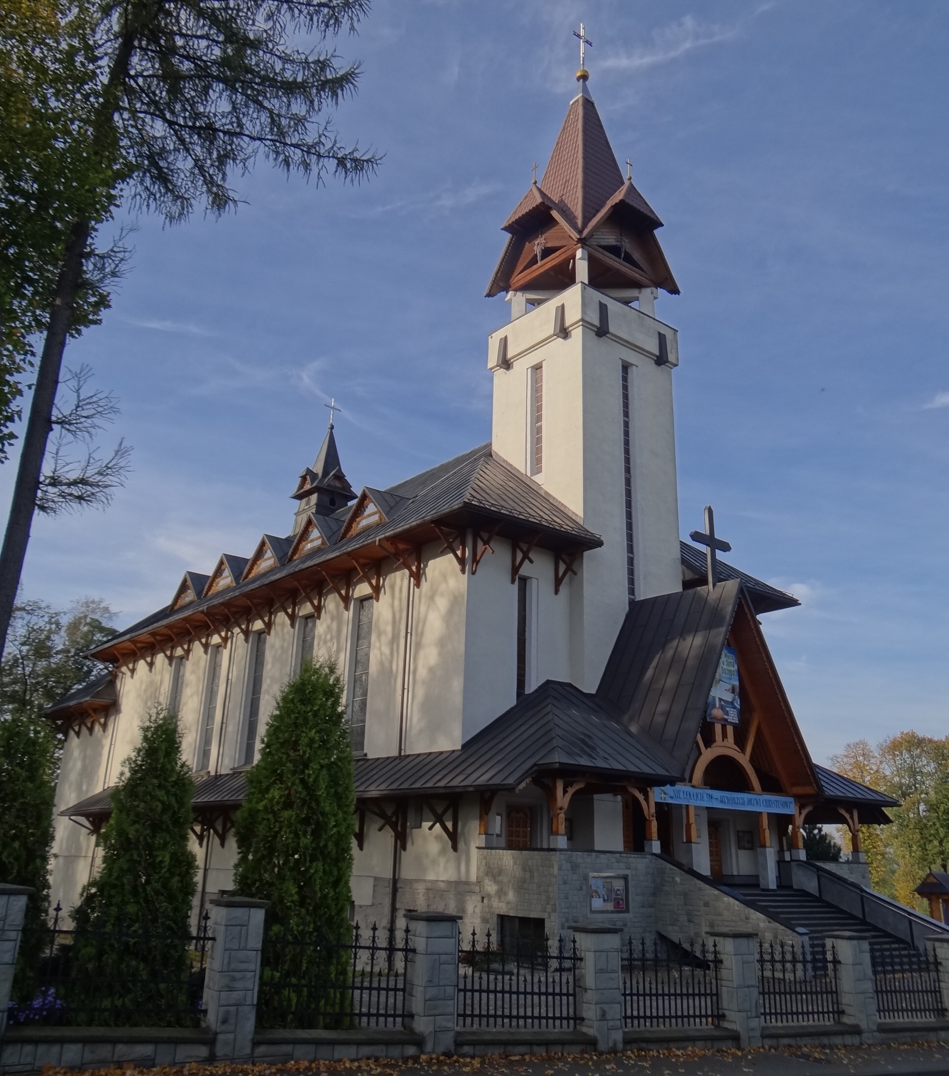 Kościół w Skawie